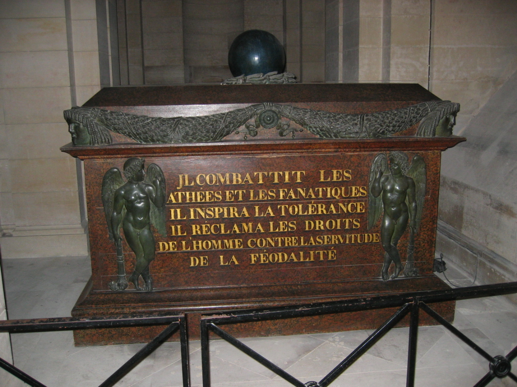 Tombeau de Voltaire au panthéon de Paris